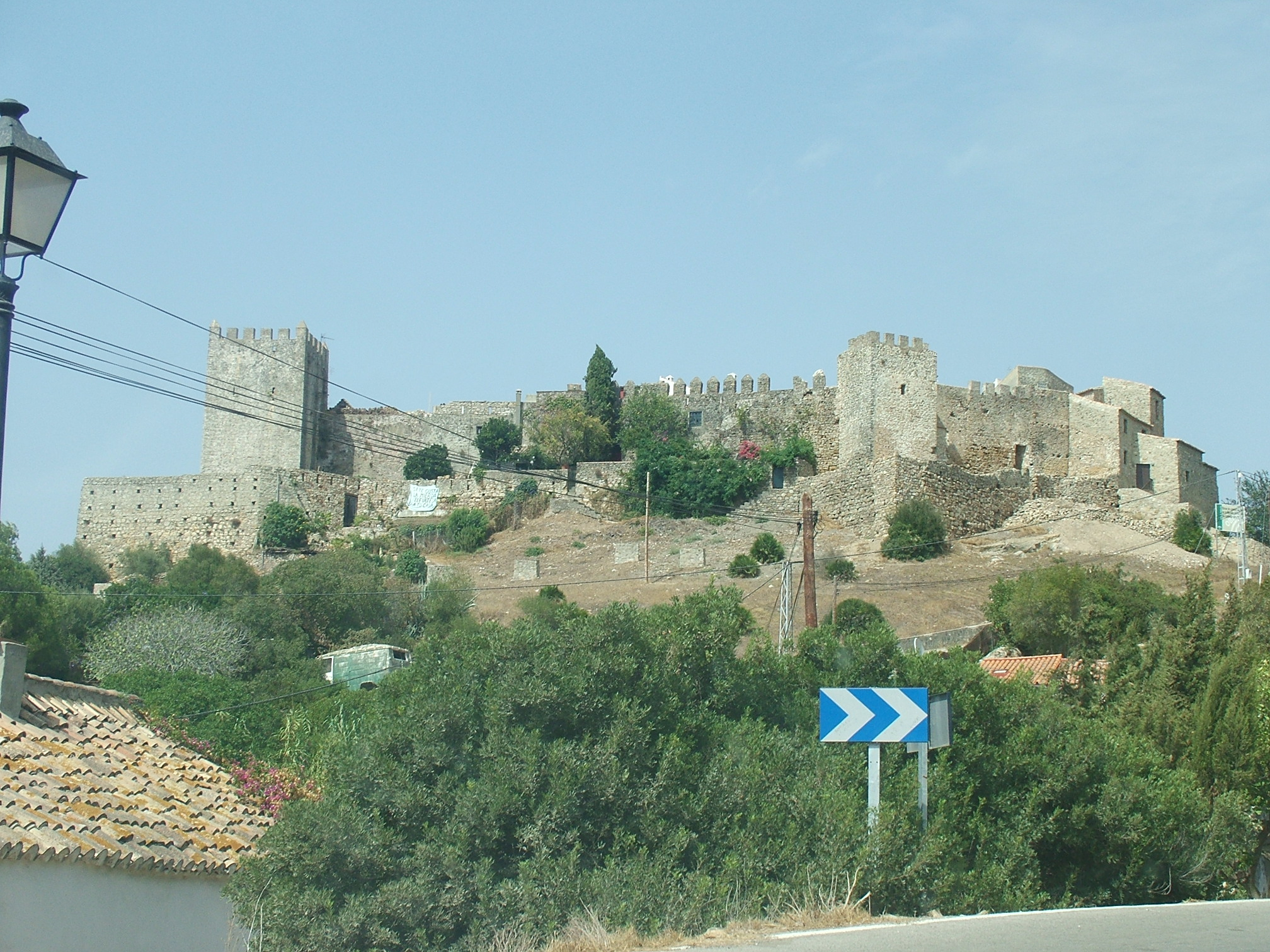 Castillo